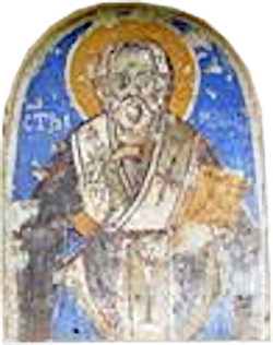 Надвходният стенопис от църквата „Свети Атанас“ в македонското село Базерник